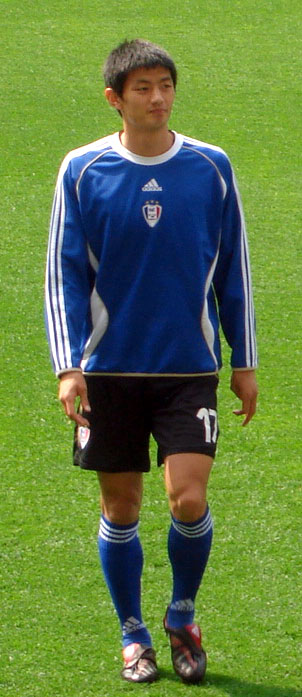 안영학. 서울월드컵경기장 정규 리그 경기 전 모습.